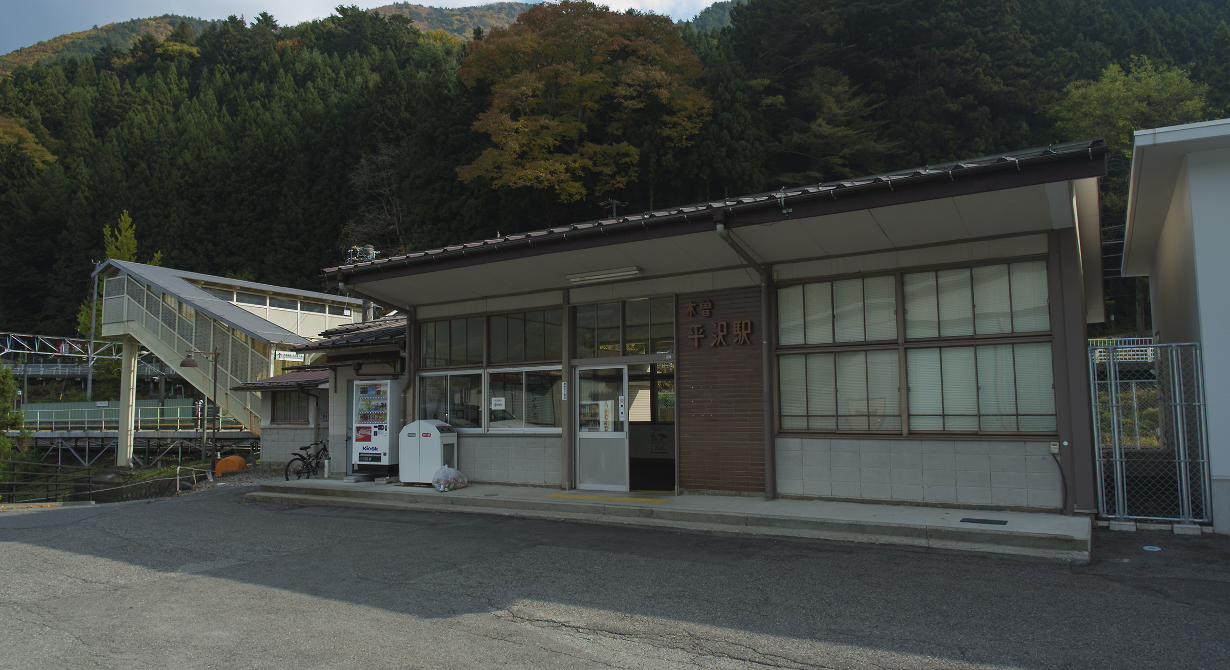 東海旅客鉄道株式会社中央本線木曽平沢駅